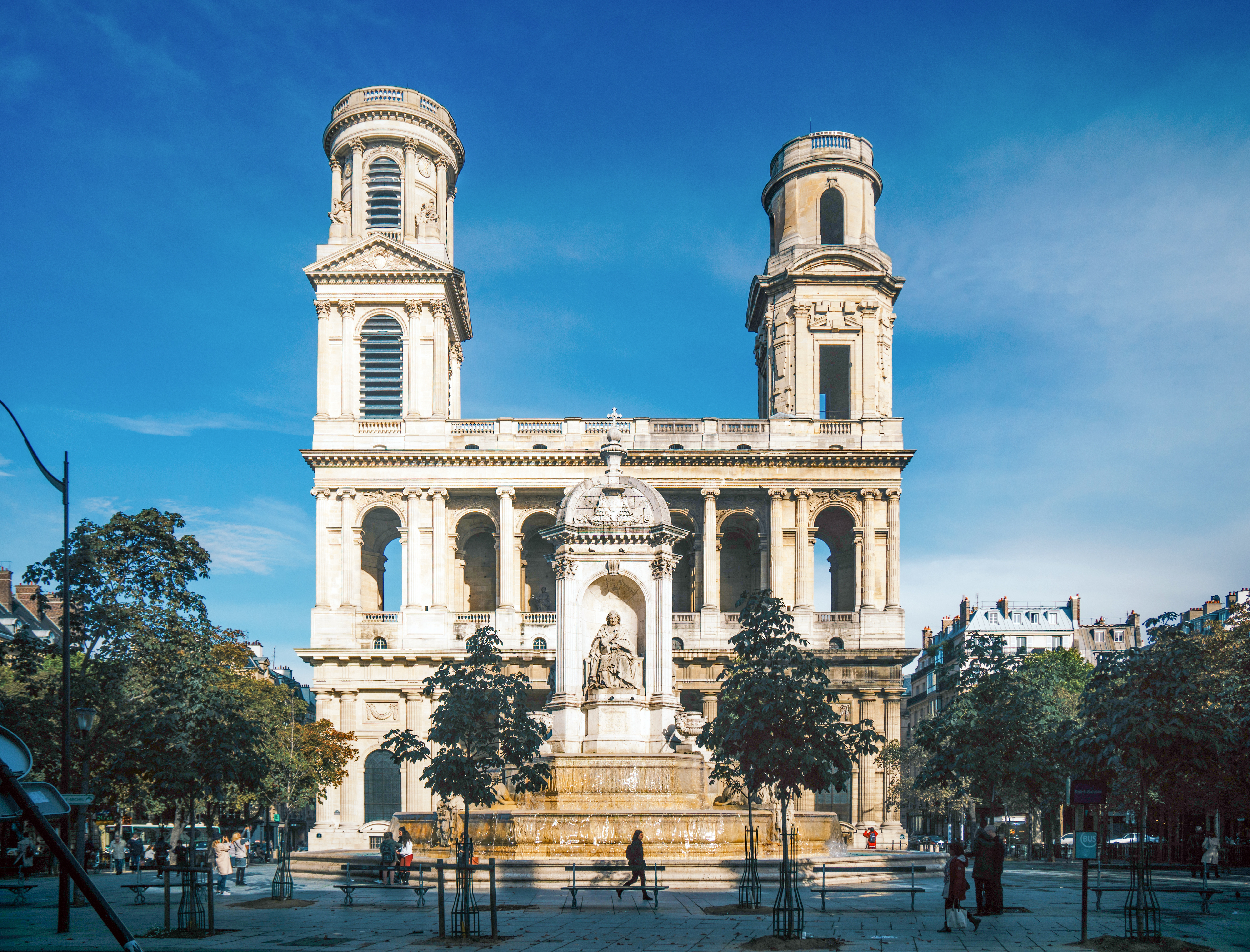 paris-195